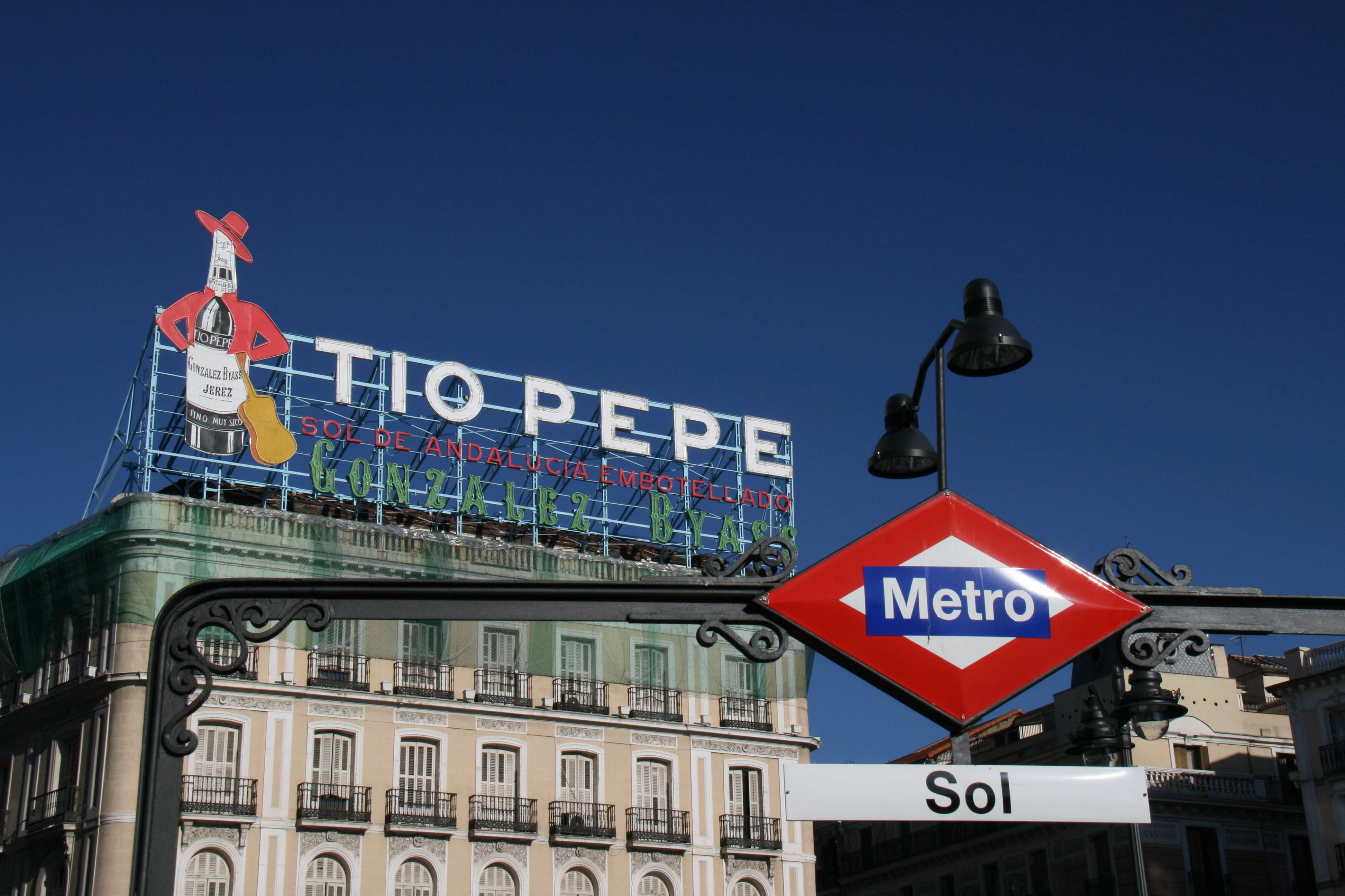 Tipo Pepe a la salida del Metro Sol